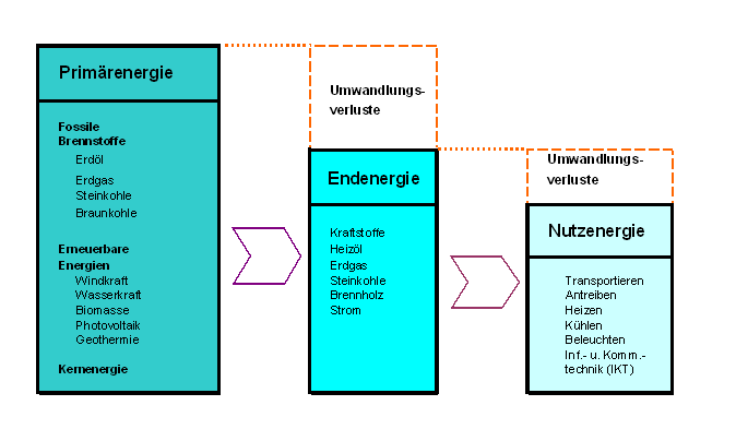 Schematische Darstellung des Zusammenhangs von Primär-, End- und Nutzenergie sowie der zugehörigen Umwandlungsverluste